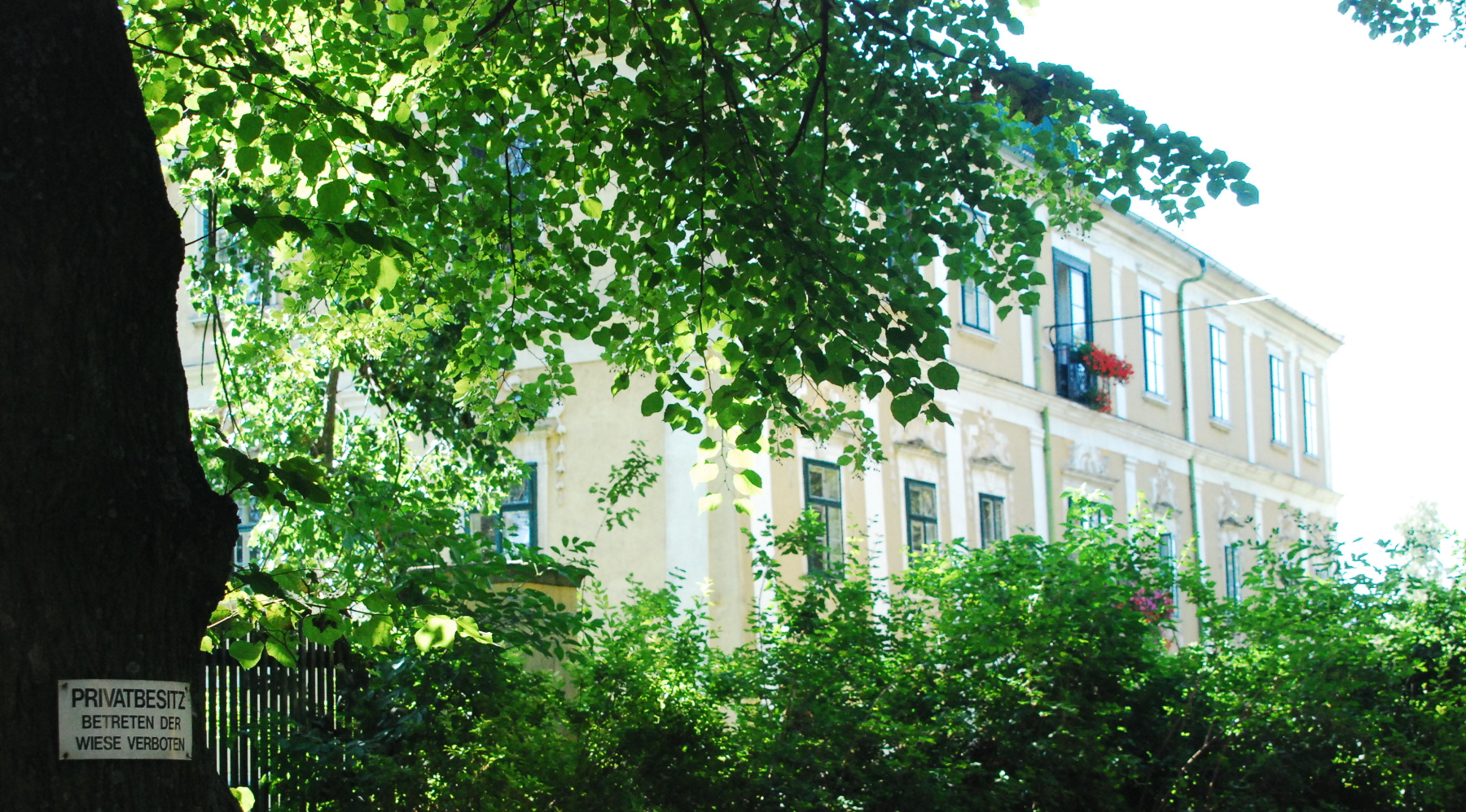 Schloss Harmannsdorf in Niederösterreich. Umständehalber kein besseres Bild möglich.